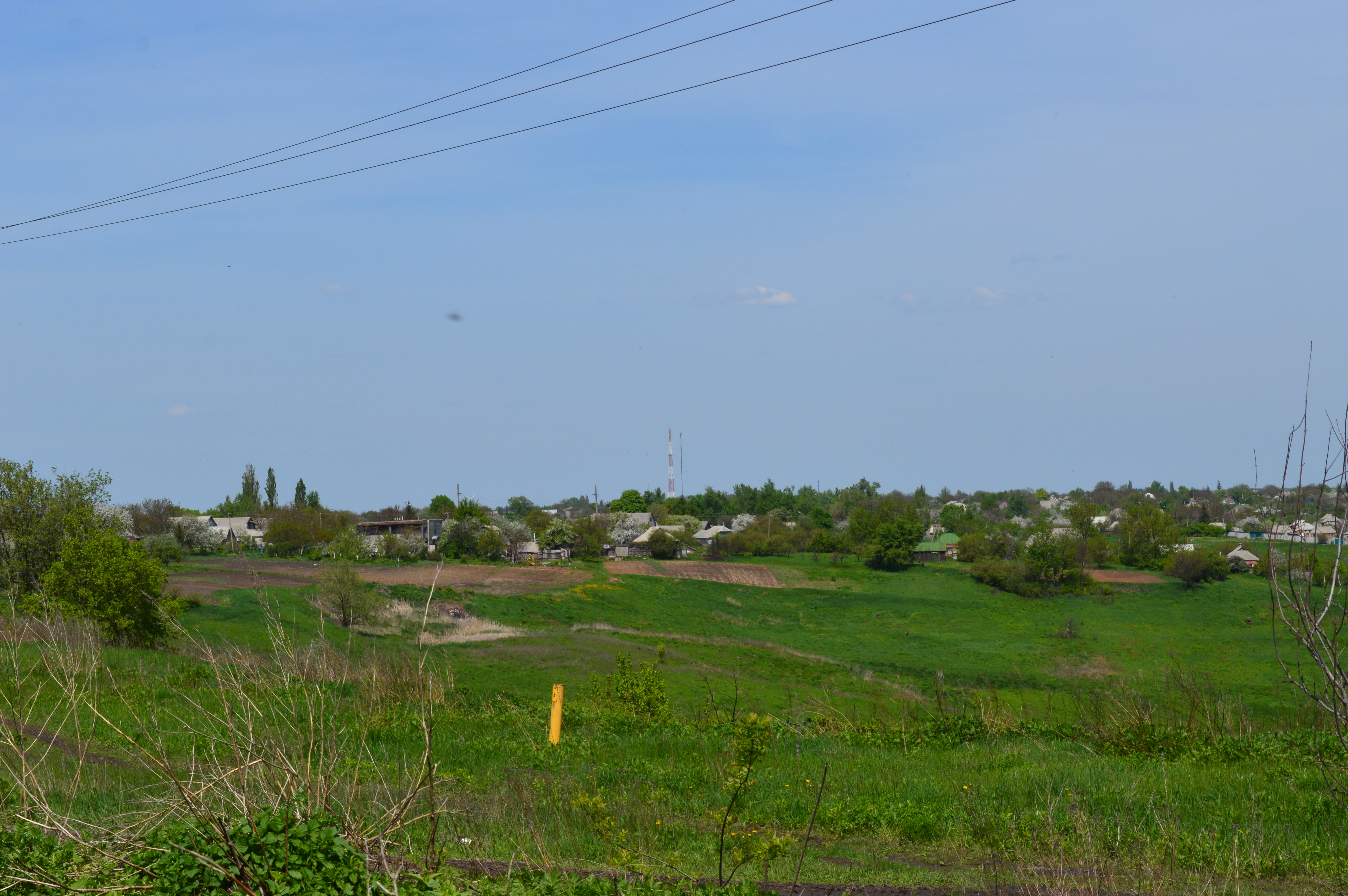 Прекрасні види Таранівки